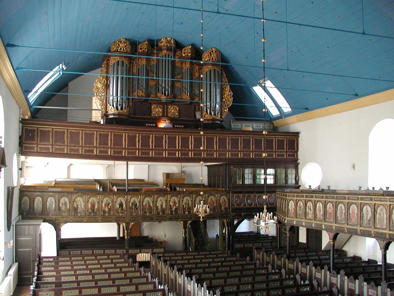 Der hintere Teil der Kirche